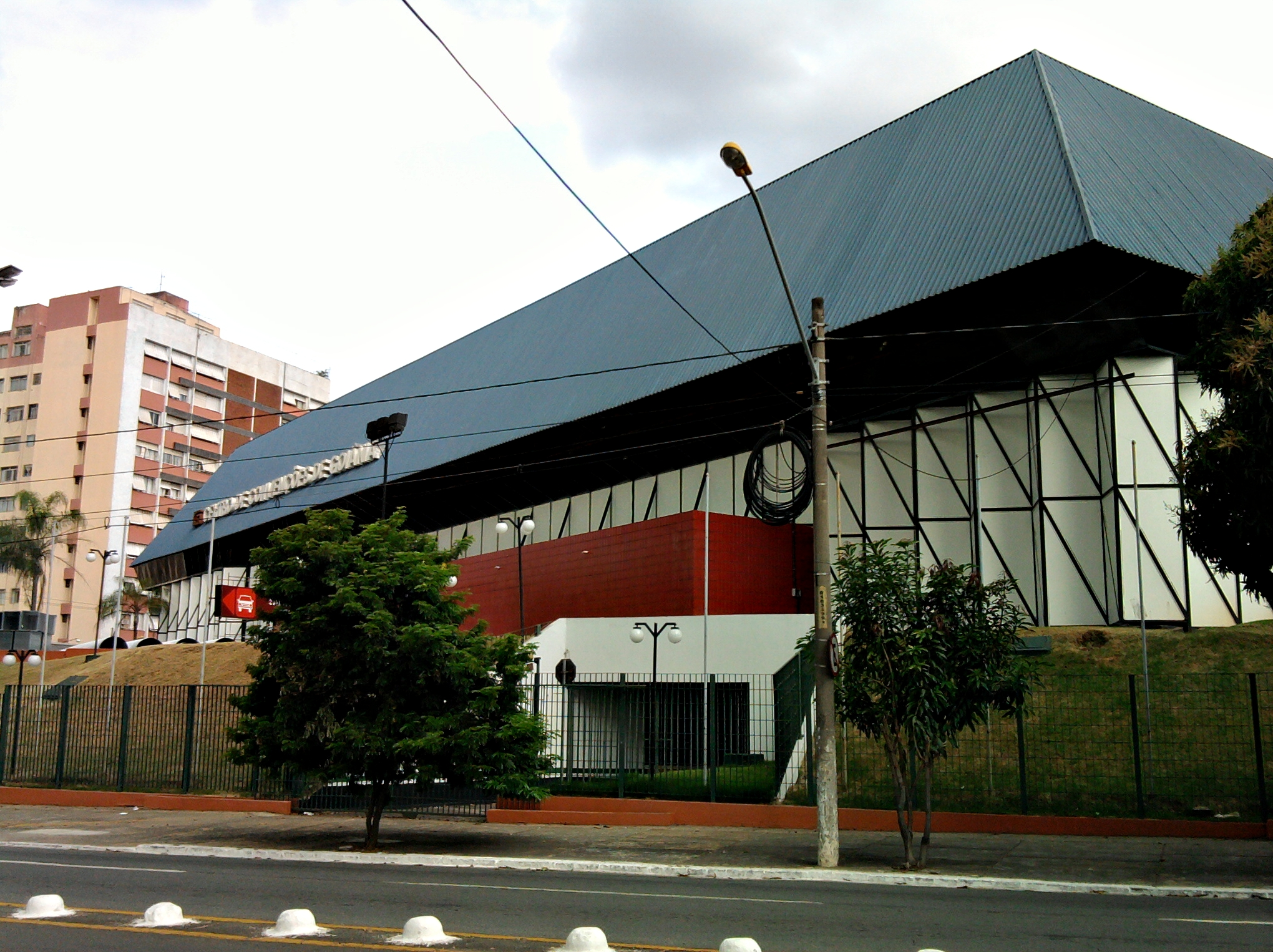 Centro de Cultura e Convenções - Goiânia - Goiás - Brasil